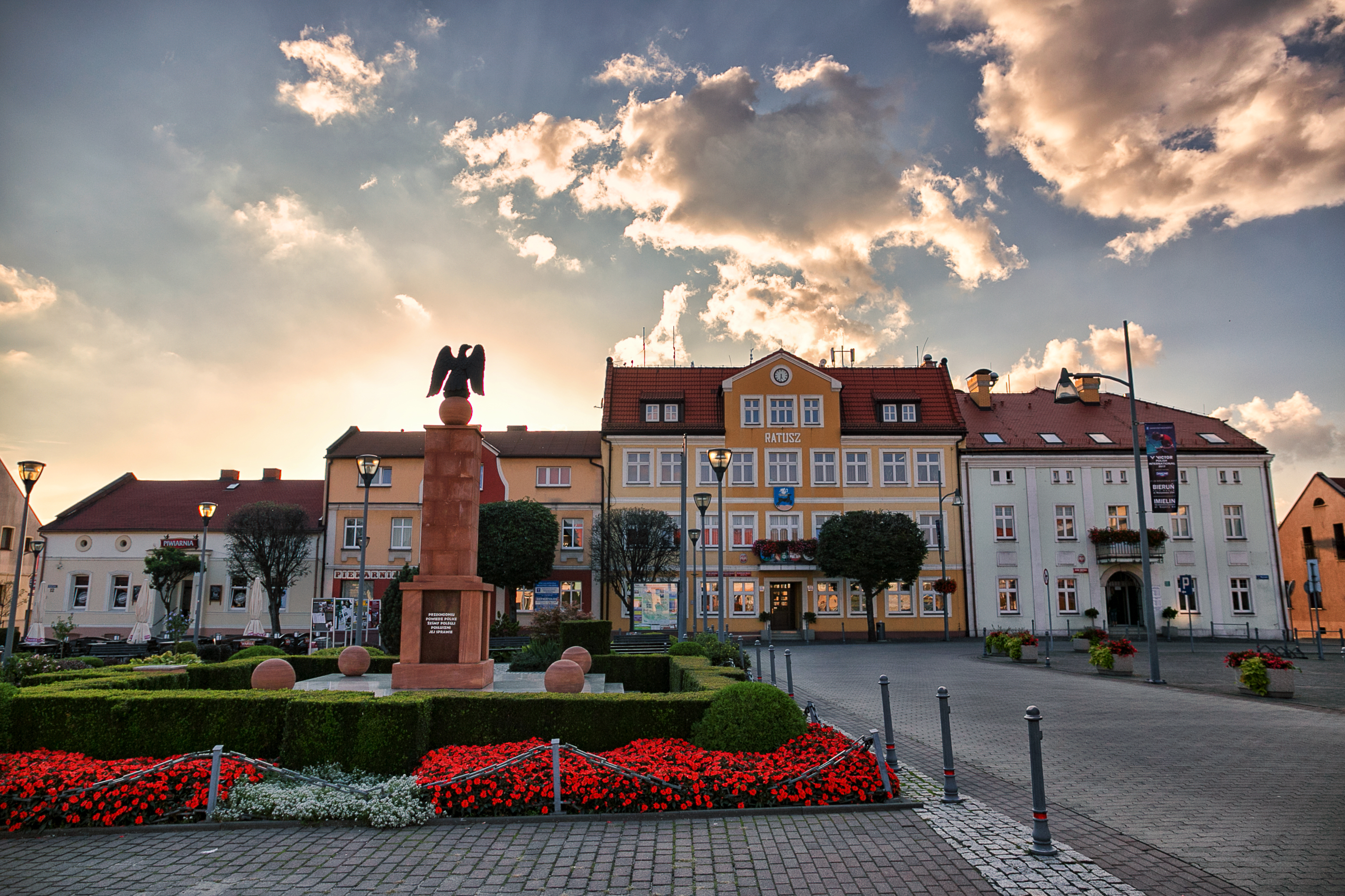 Miasto w ramach historycznego założenia Wikidata has entry Q30060249 with data related to this item.